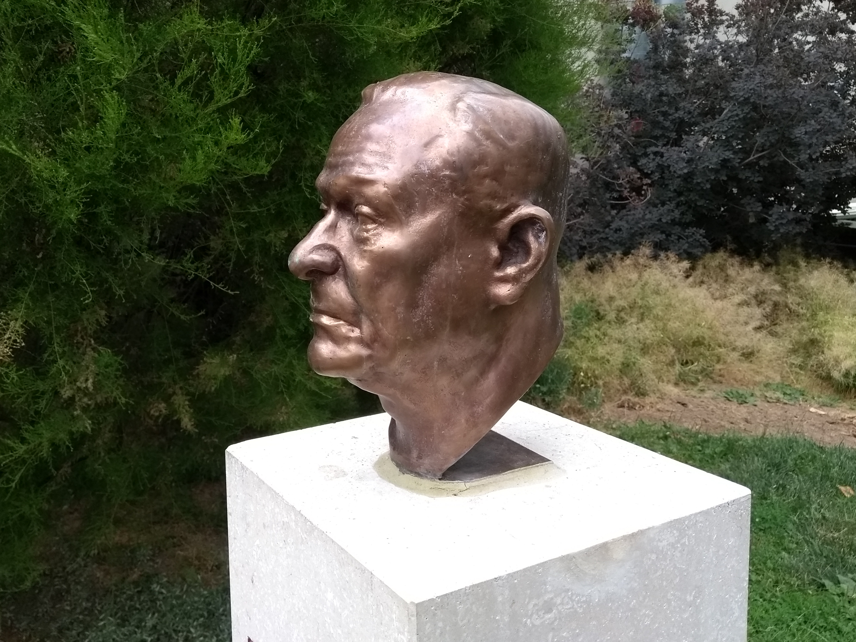 Wien/Mariahilf, Richard-Waldemar-Denkmal am 6. Juni 2018